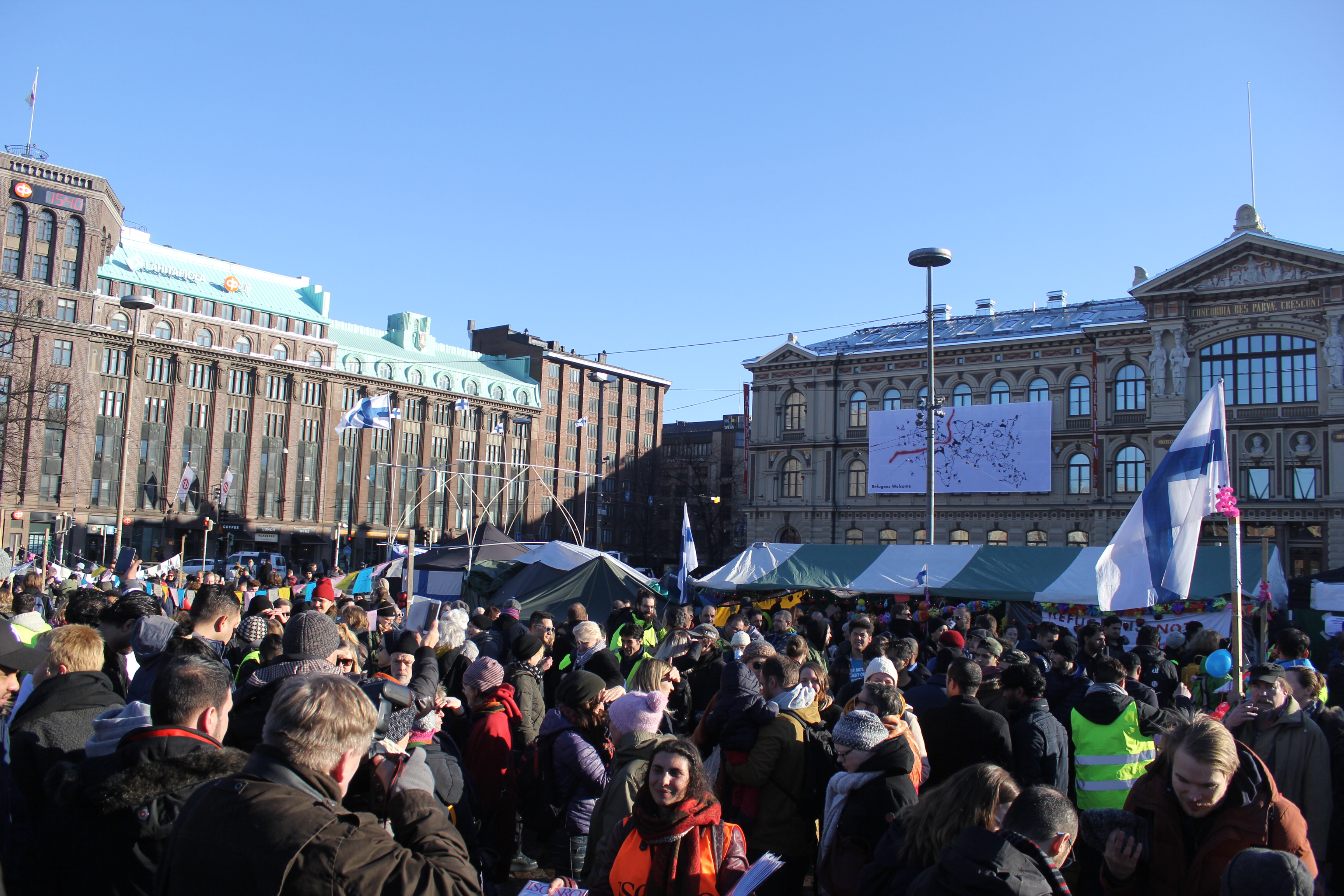 Helsingin rautatientori 11.3.2017